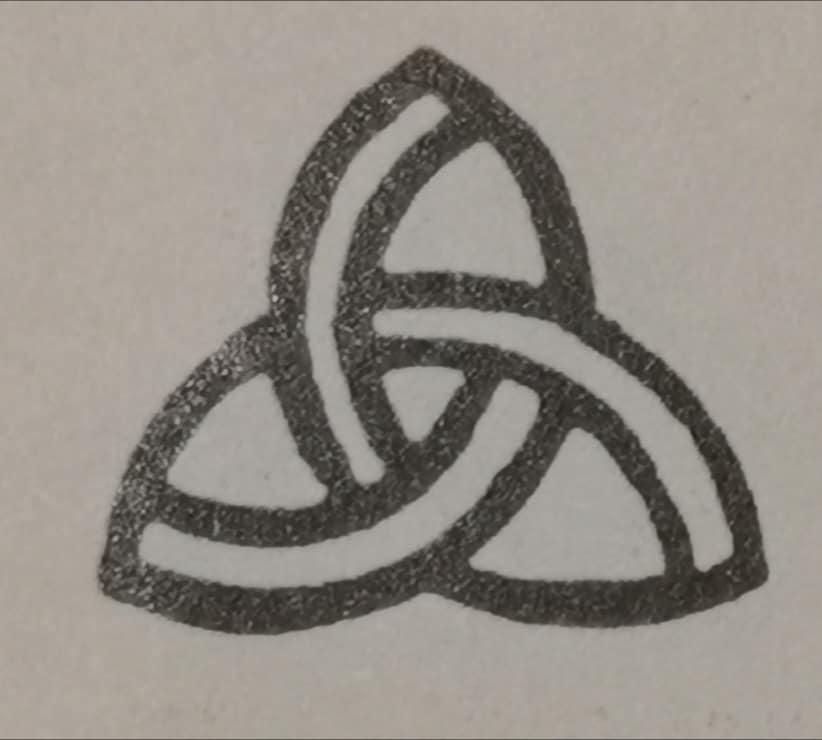 2004年に合併により廃止された久美浜町（現・京丹後市久美浜町）の町章